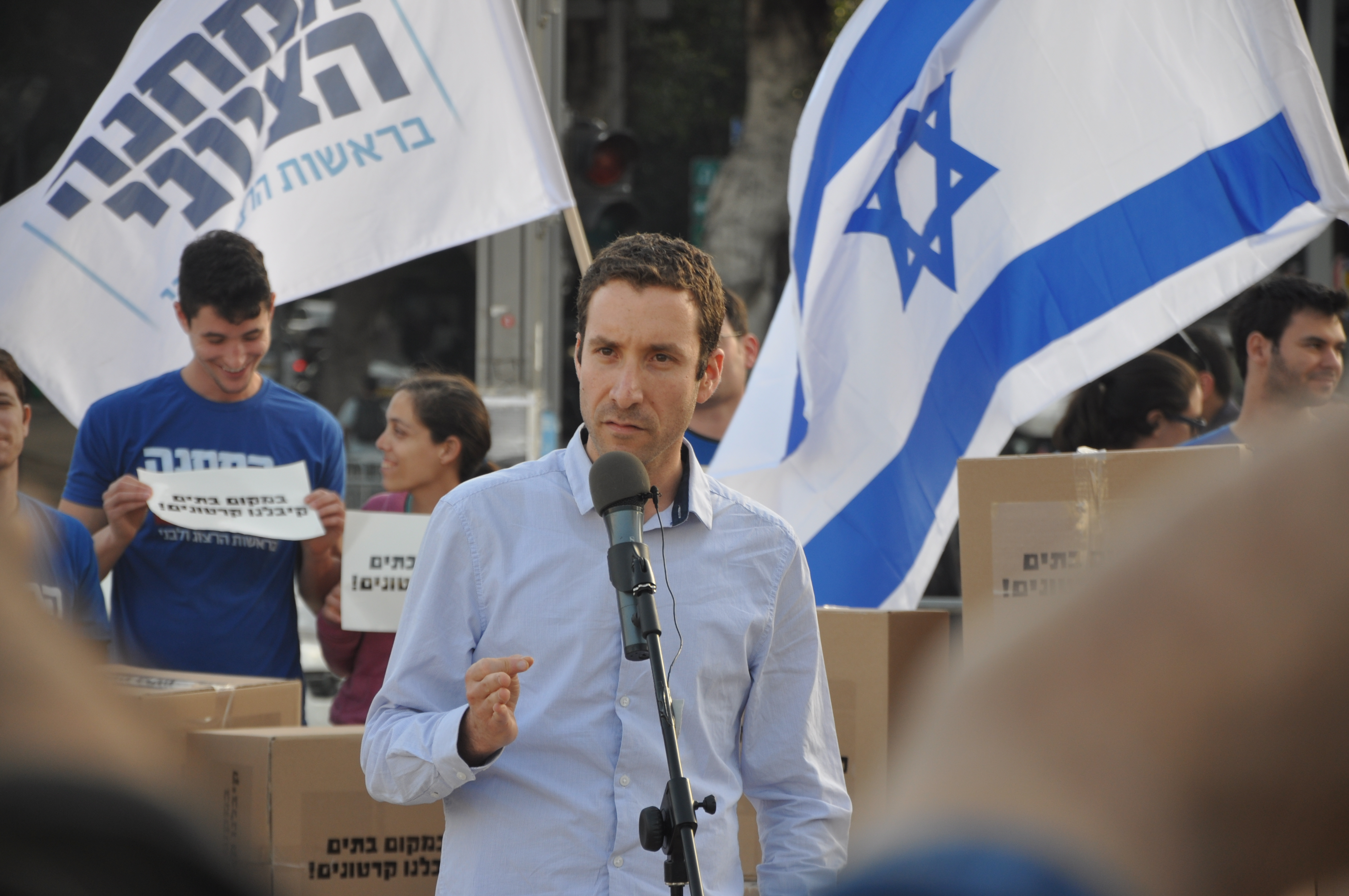 איציק שמולי במהלך מחאה על יוקר הדיור